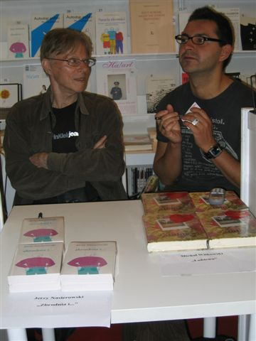 Jerzy Nasierowski (b. 1933), Polish actor, & Michał Witkowski (b. 1975), Polish writer